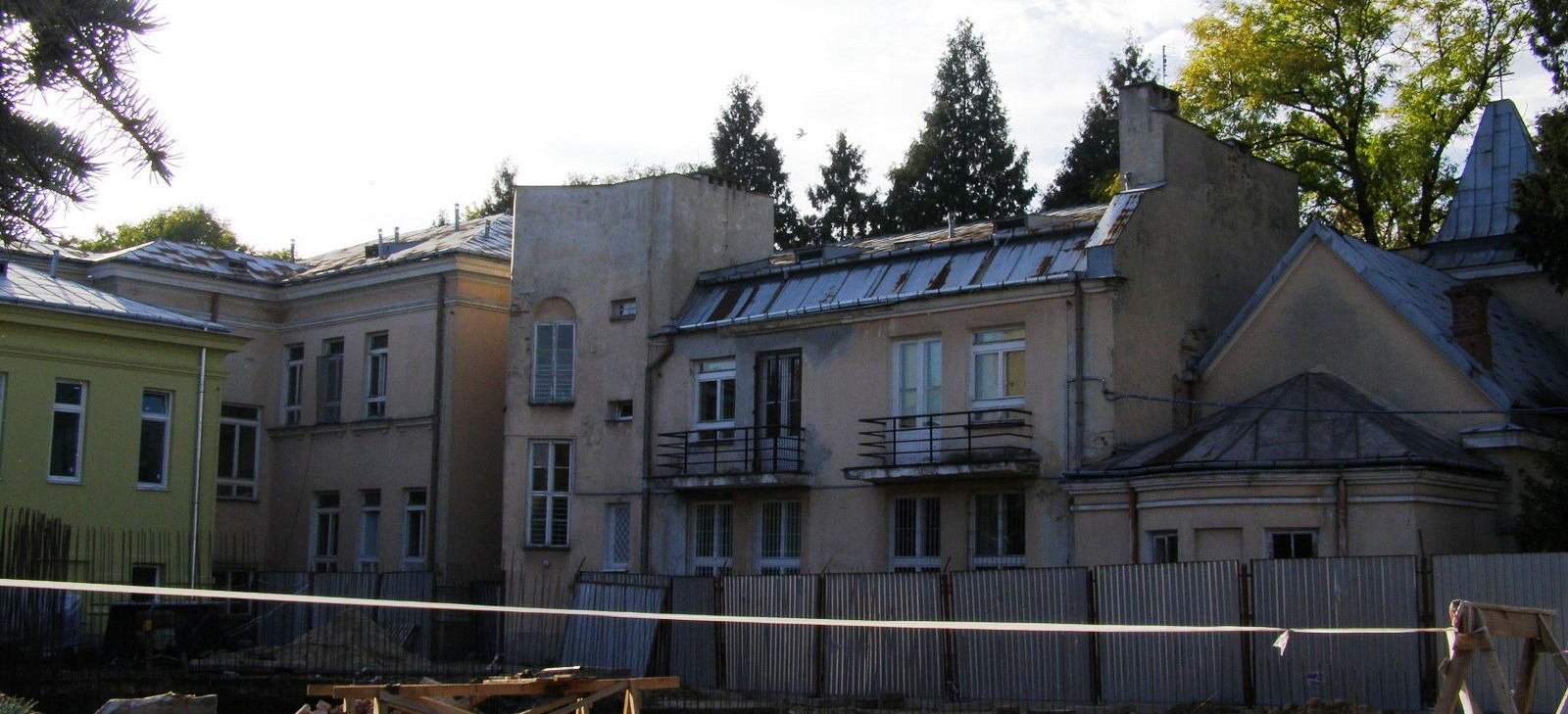 Old Part of Hospital in Mińsk Mazowiecki / Stara część szpitala w Mińsku Mazowieckim